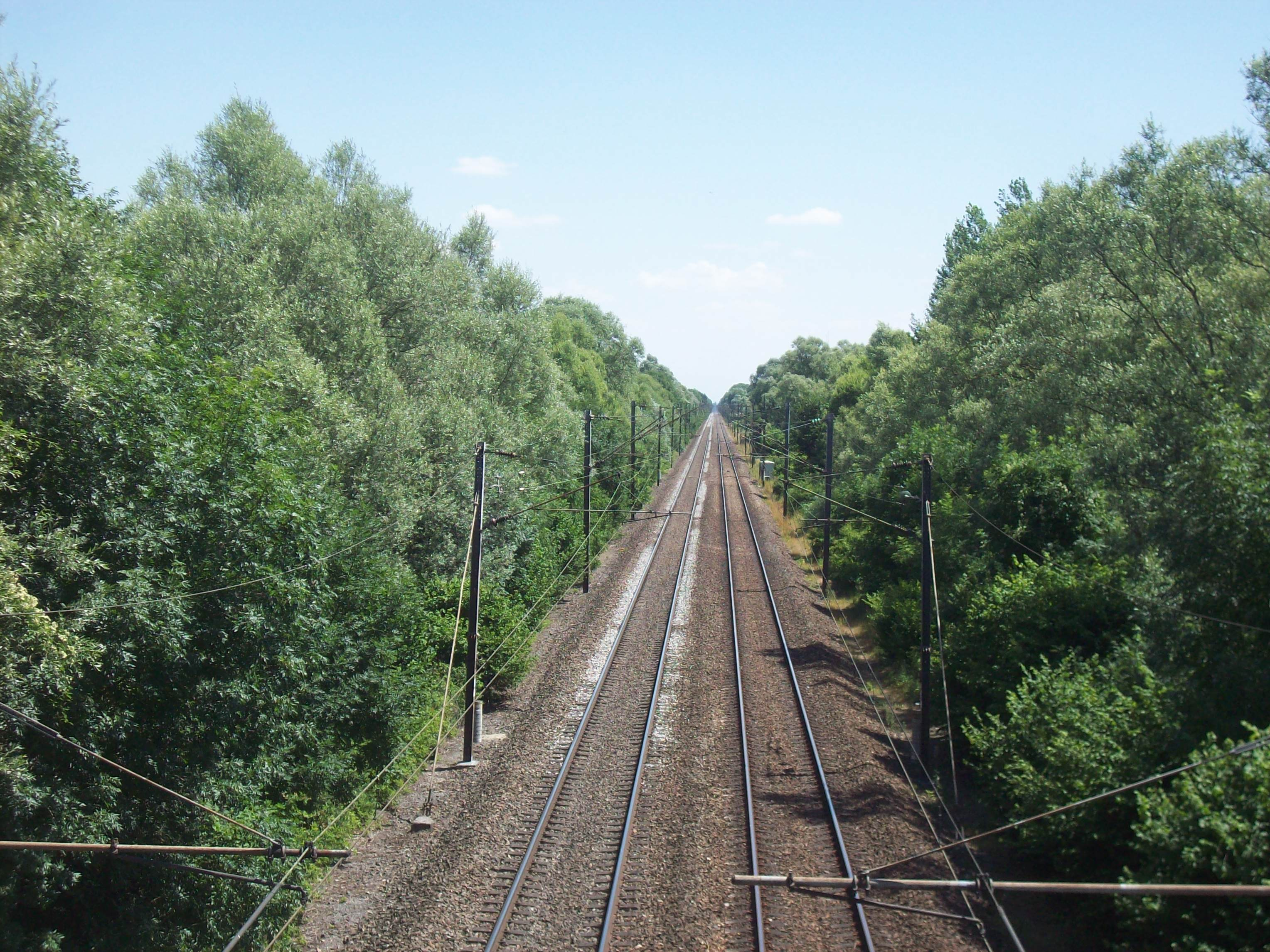 La voie ferrée de la ligne Paris-Strasbourg à Plivot.